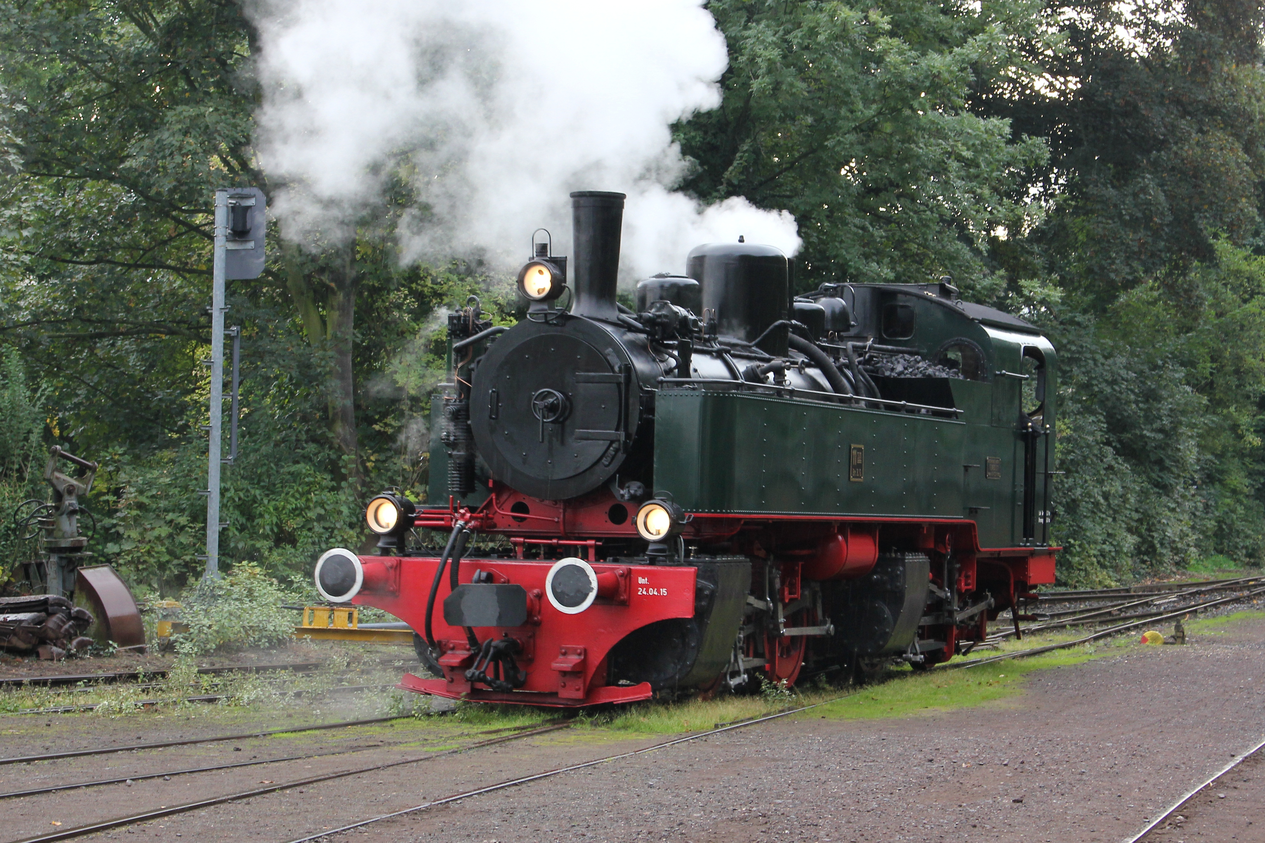 Mallet-Lokomotive der Brohltalbahn, 1906 von der Maschinenfabrik Humboldt in Köln-Kalk gebaut, Nr. 348, nach der letzten Fahrt vom 29. Januar 1966 stillgelegt und von November 2008 bis Februar 2015 restauriert, erste planmäßige Fahrt danach am 1. Mai 2015